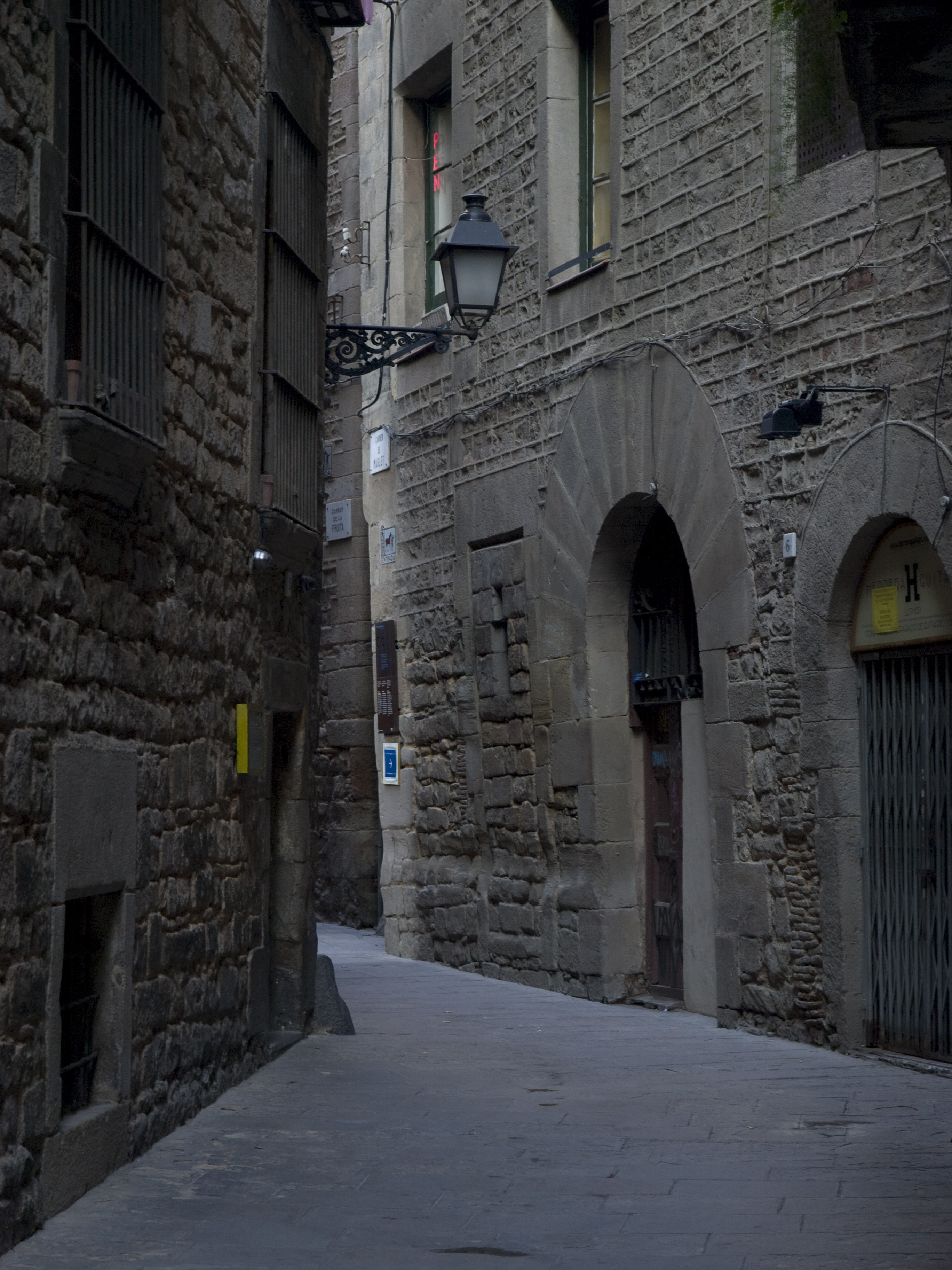 Foto del call de barcelona, a la cantonada hi ha la sinagòga